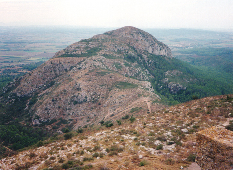 Berg Ulla im Montgri Massiv